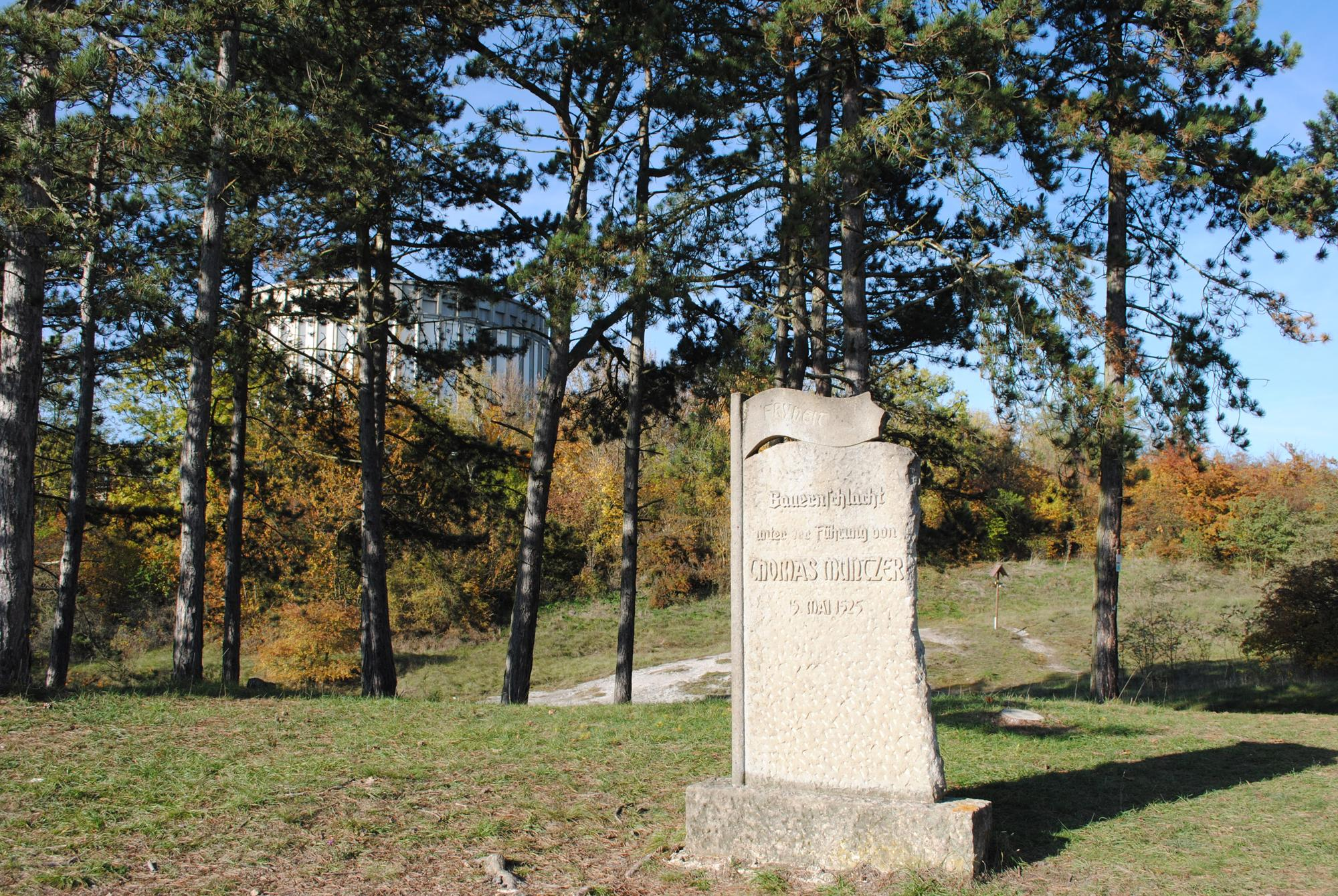 Weißer Berg in Bad Frankenausen mit Bauernkriegsdenkmal Im Hintergrund das Bauernkriegspanorama